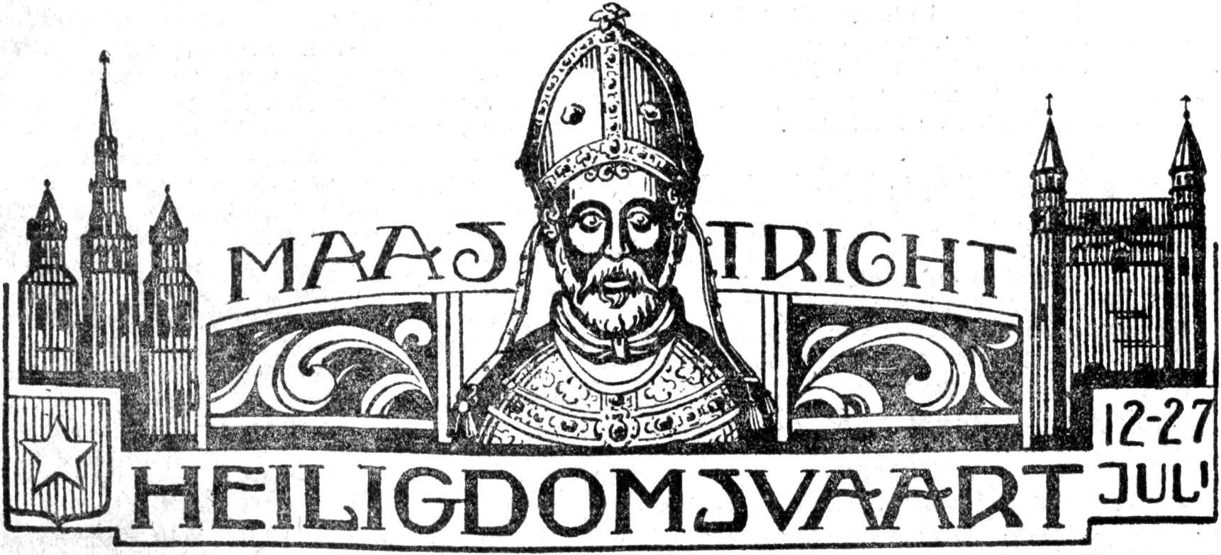 Kop Heiligdomsvaart Maastricht 12-27 Juli. Afkomstig uit de Limburger Koerier, vrijdag 2 mei 1930, tweede blad, [p. 1].